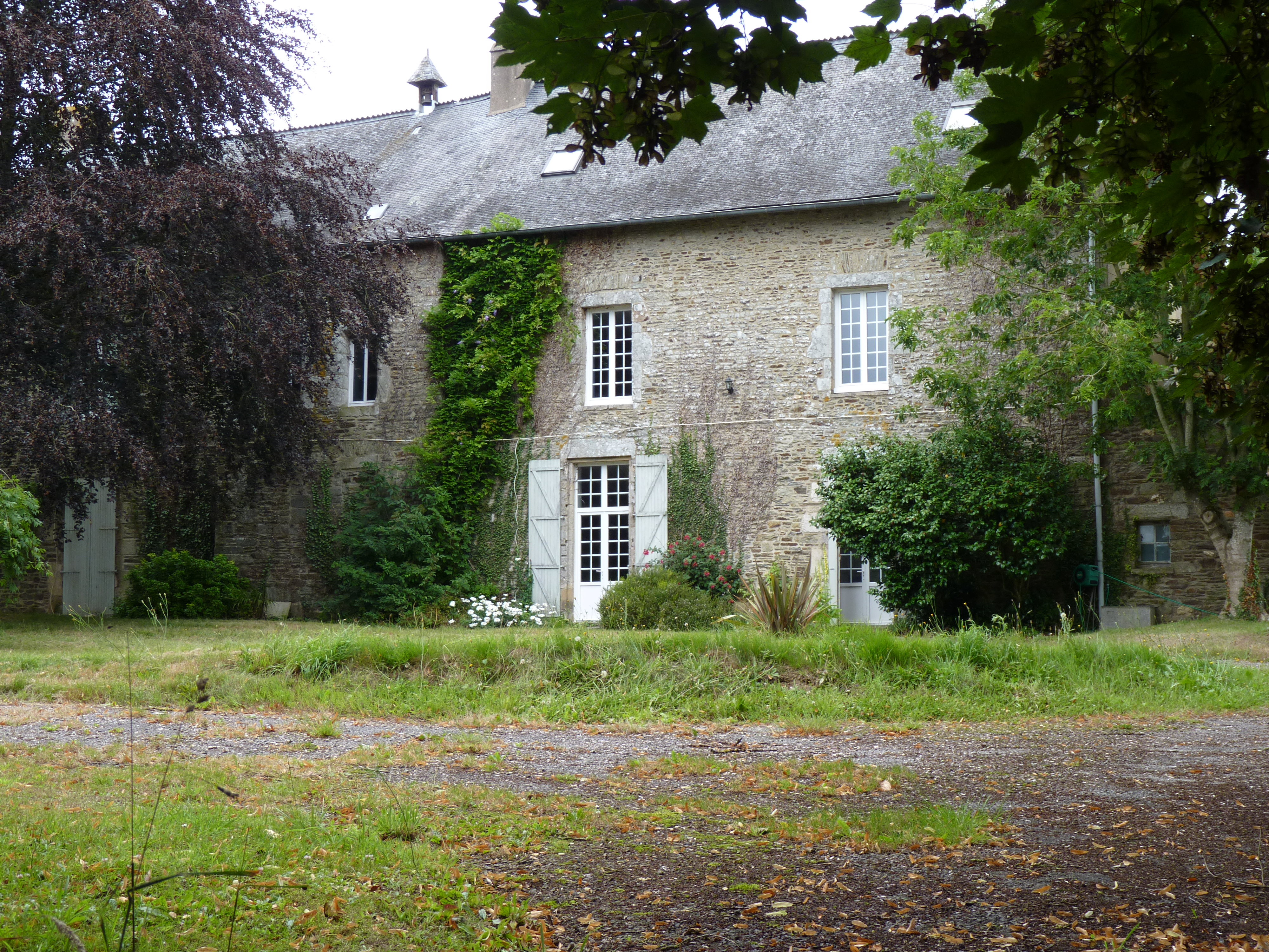 Manoir du Quengo, Rohan, Morbihan